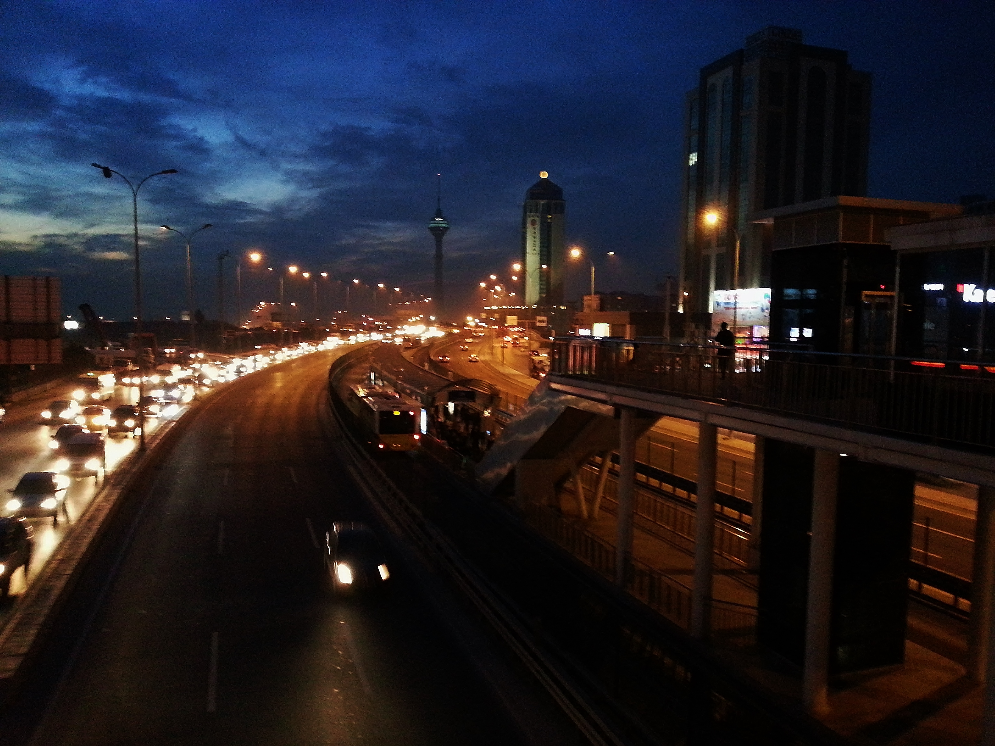 Hadımköy (Beykent) Metrobüs Durağı / Hadimkoy (Beykent) Station of the Beylikduzu Metrobus line